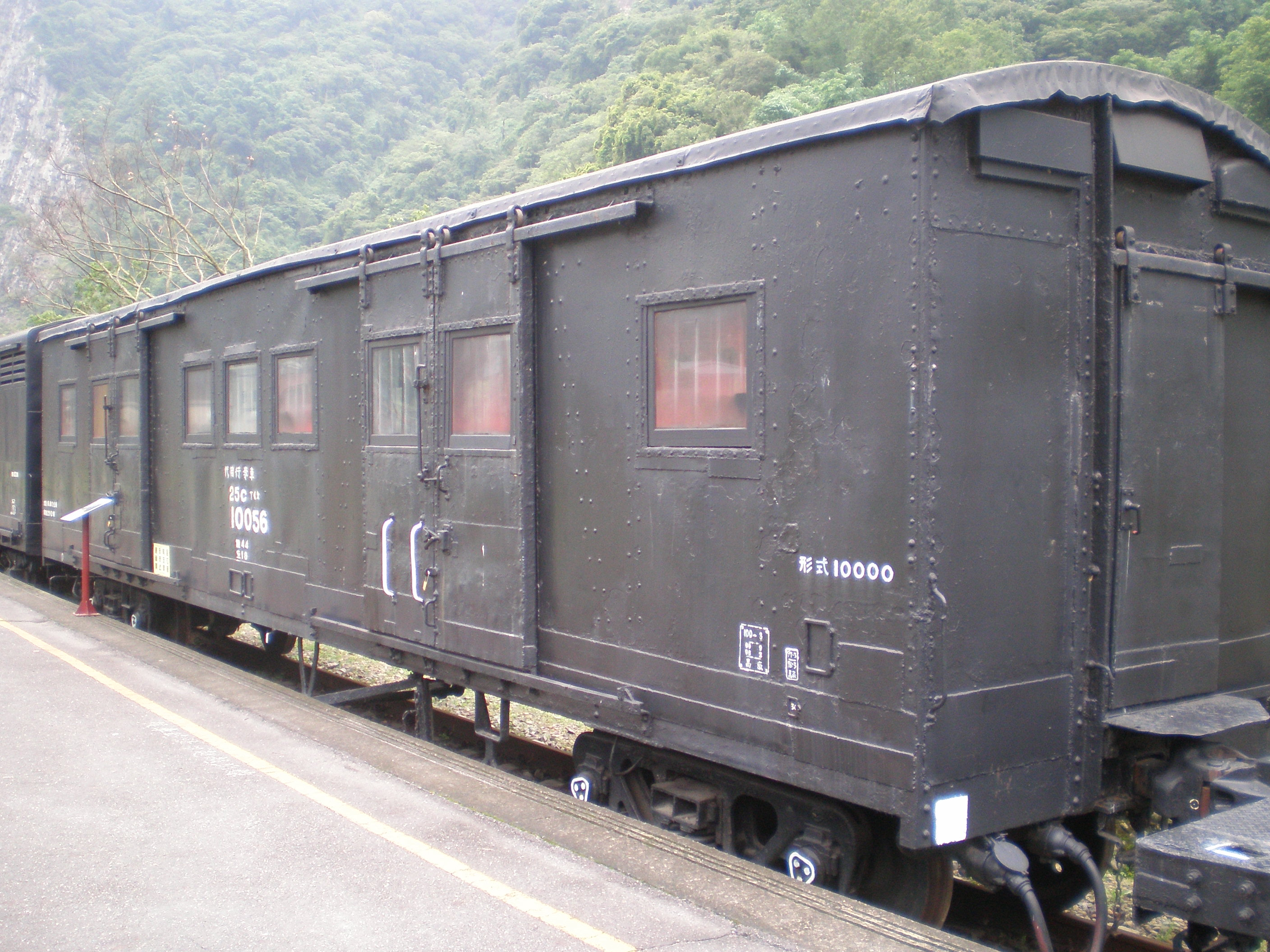 臺灣鐵路管理局代用行李車25C10056，攝於車埕車站。